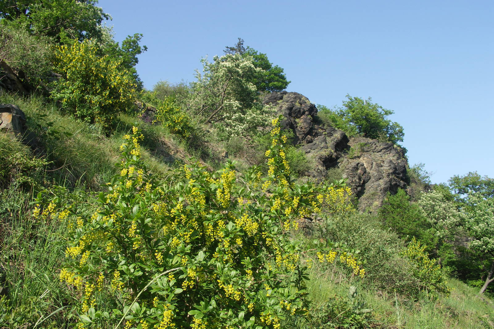 Přírodní památka Bohnické údolí, Praha, Czech Republic Jiří Vackář 23:07, 11 May 2006 (UTC)